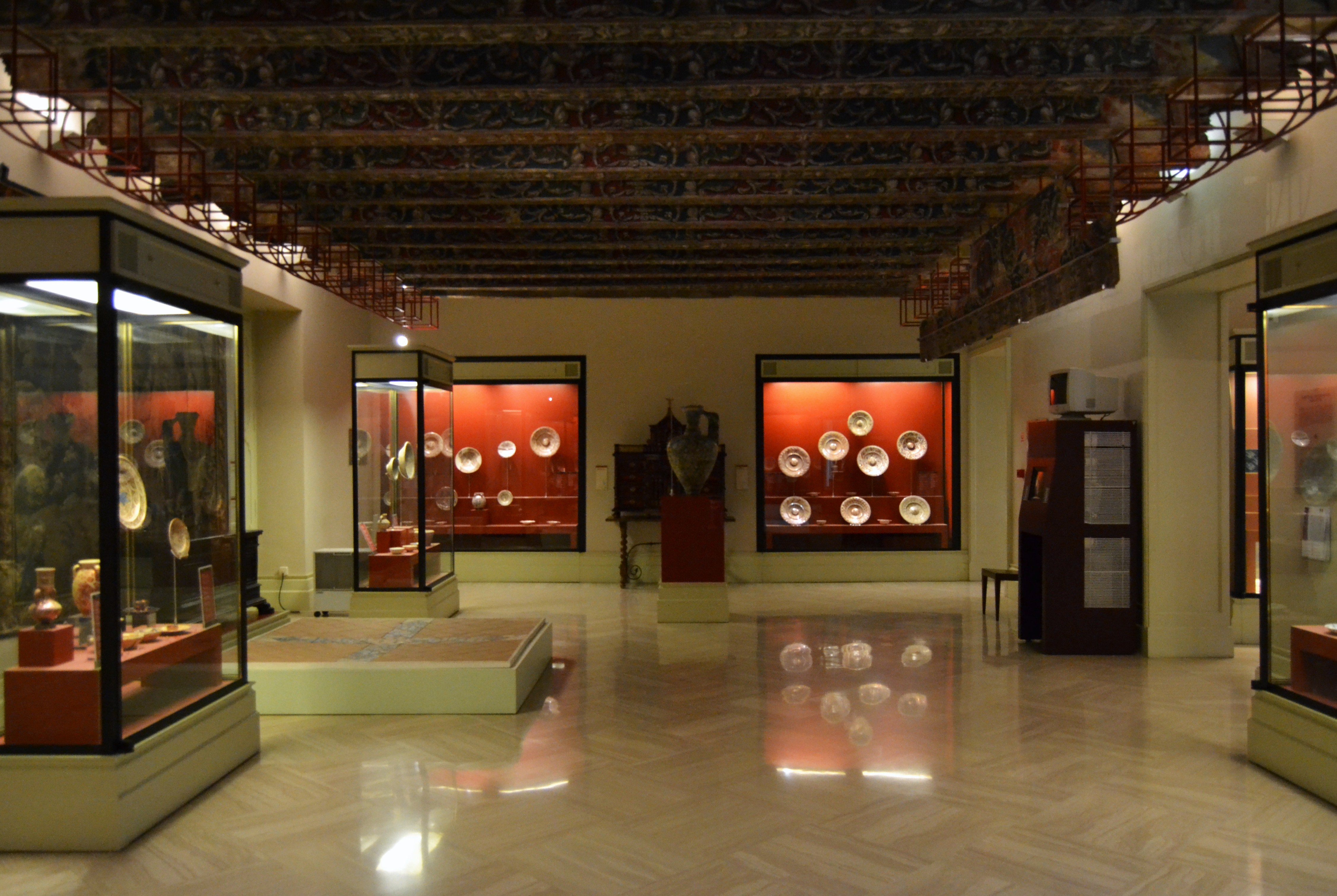 Sala de la ceràmica dels segles XVI, XVII i XVIII, museu de Ceràmica de València.